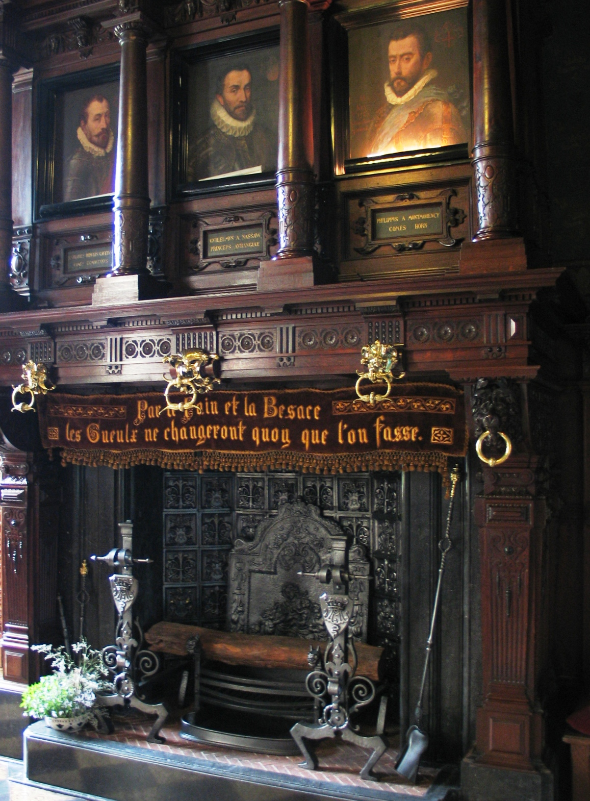 Echte hangijzers in het kasteel van Gaasbeek, die men gebruikte om schoenen of laarzen en kleren te drogen en die aan de haard hete hangijzers konden worden - eigen foto